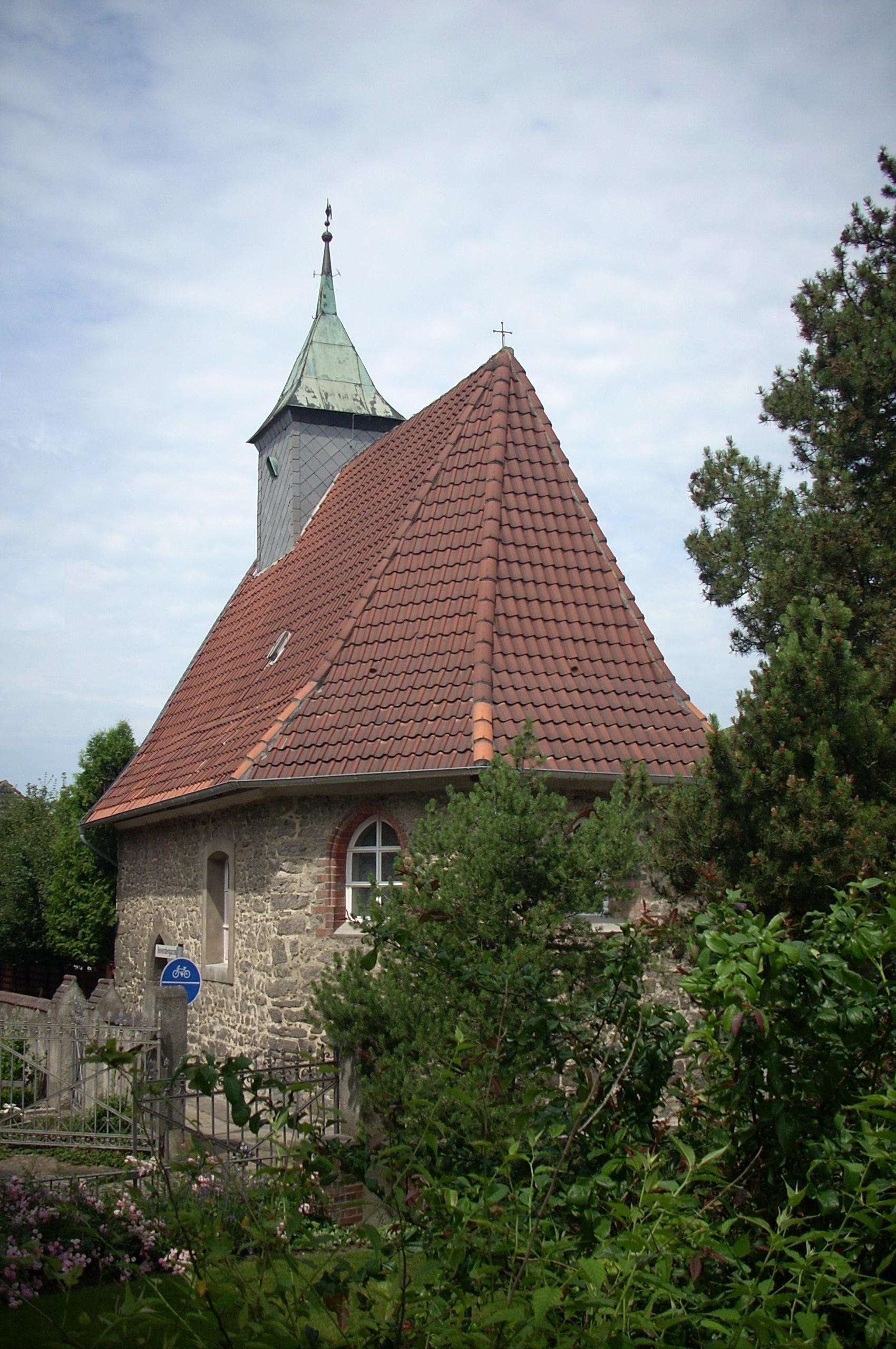 Ev. Kapelle Höver, Sehnde, Germany